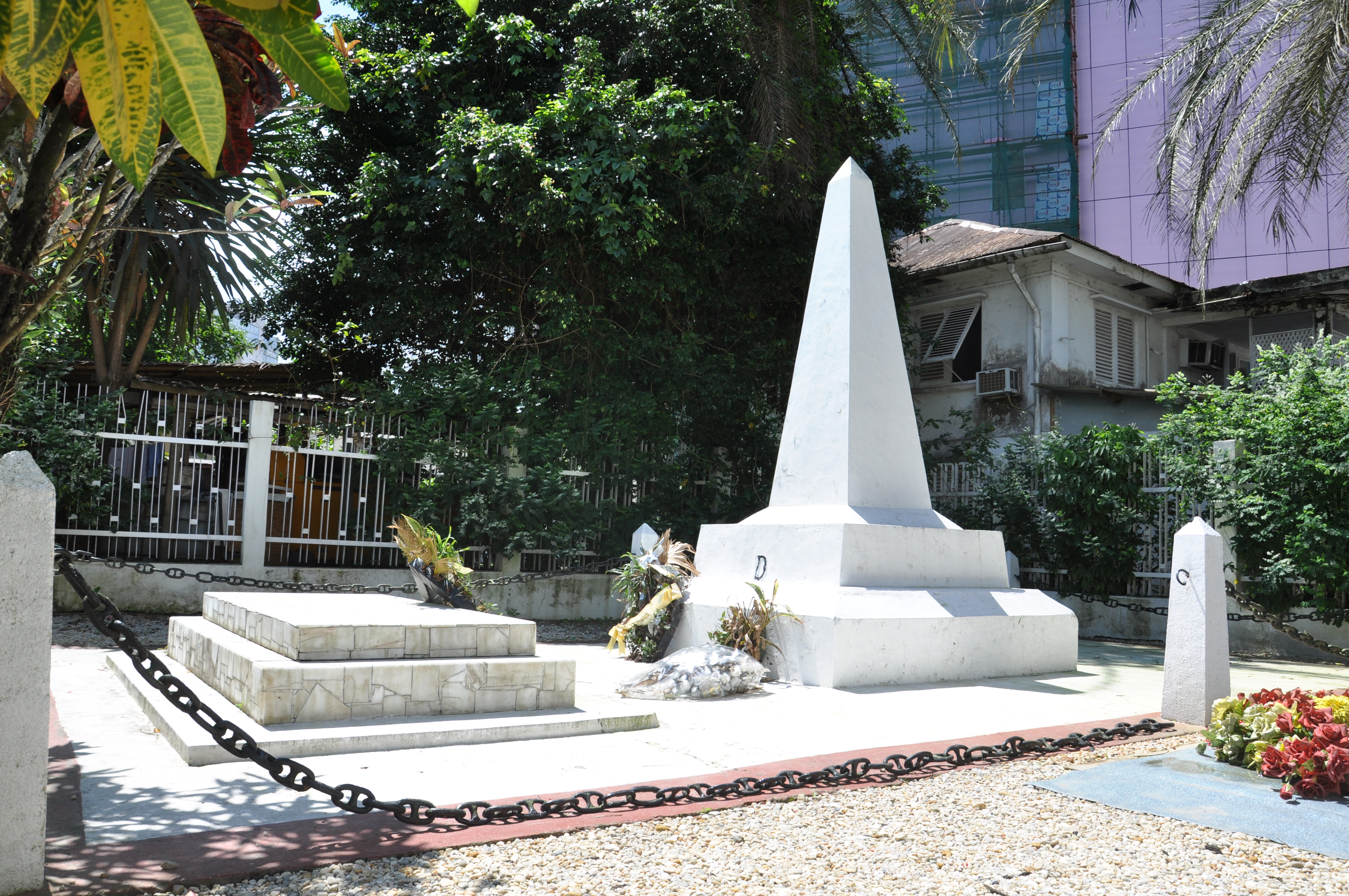 Monument funéraire des rois Bell